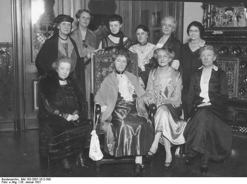 Franziska Ellmenreich, 80. Geburtstag Franziska Ellmenreich (im Sessel), (Baronin Fuchs-Nordhoff) die hervorragende Vertreterin gediegener Schauspielkunst feiert heute ihren 80. Geburtstag Abgebildete Personen: Ellmenreich, Franziska: Schauspielerin, Deutschland